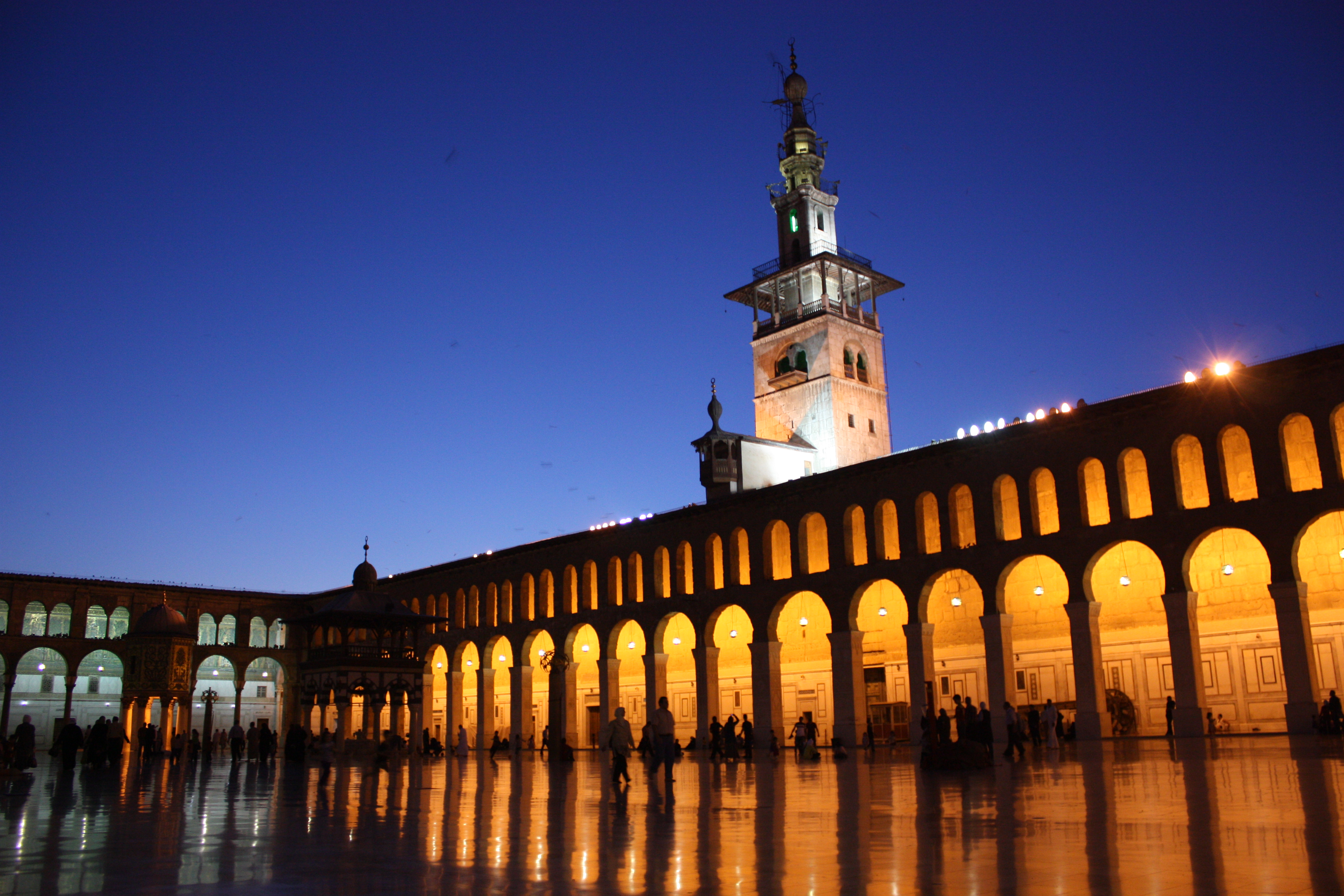 Damascus, Umayyad Mosque